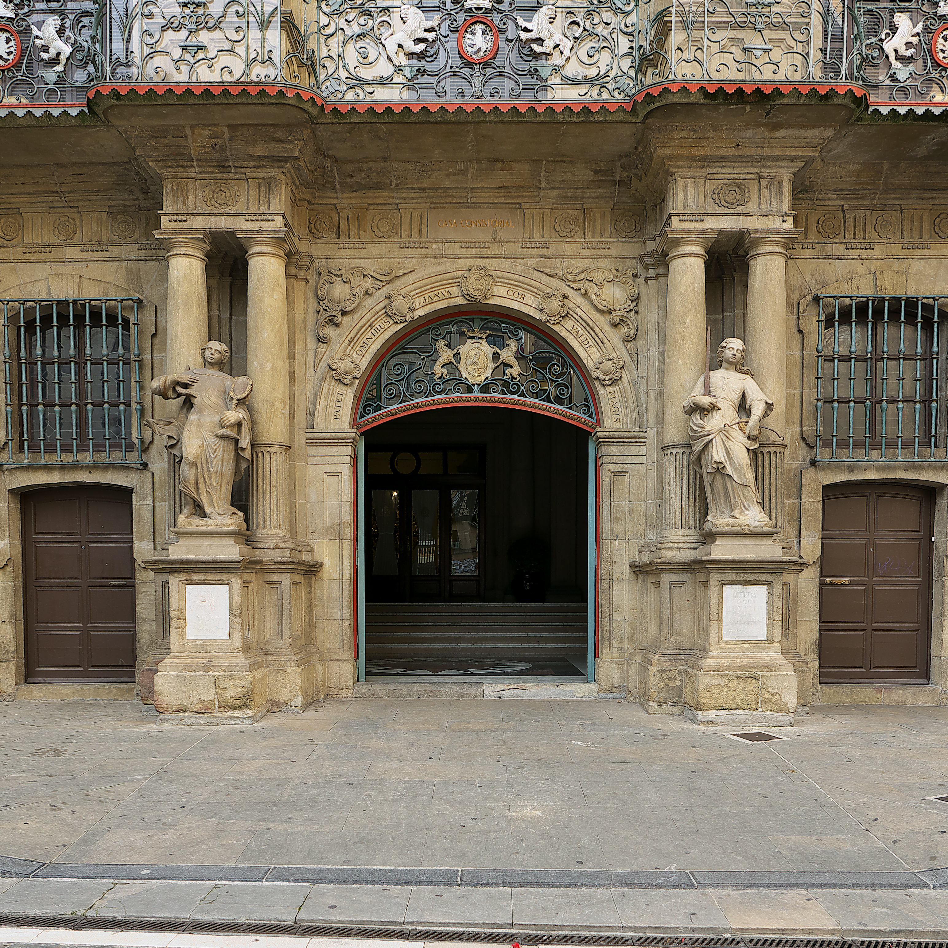 Portada de la Casa Consistorial (1755-1760)